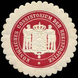 Sealing stamp Title: Königliches Consistorium der Rheinprovinz Description: weiß, dunkelrot, geprägt, Kirche Place: Koblenz size: 4 cm